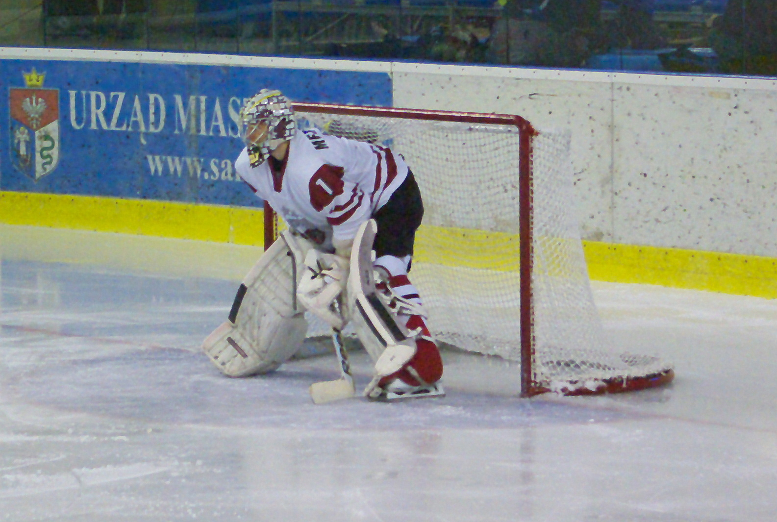 Elvis Merzlikins podczas Mistrzostw Świata Juniorów w Hokeju na Lodzie 2014 I Dywizji w Sanoku, Dania - Łotwa 4:1, Arena Sanok 19 grudnia 2013